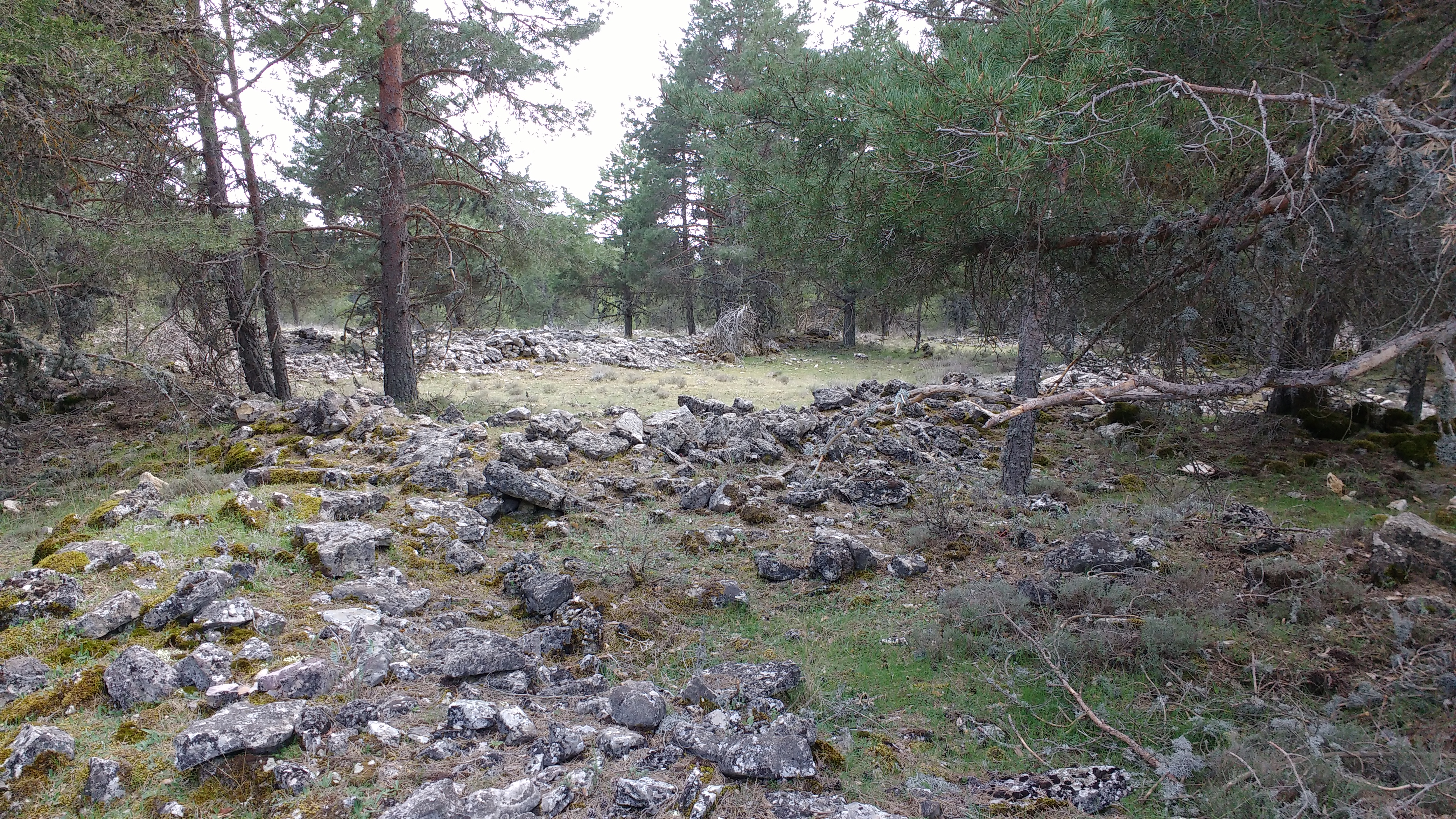 Dos plantas rectangulares pertenecientes a las extensas ruinas de Los Casaricios.